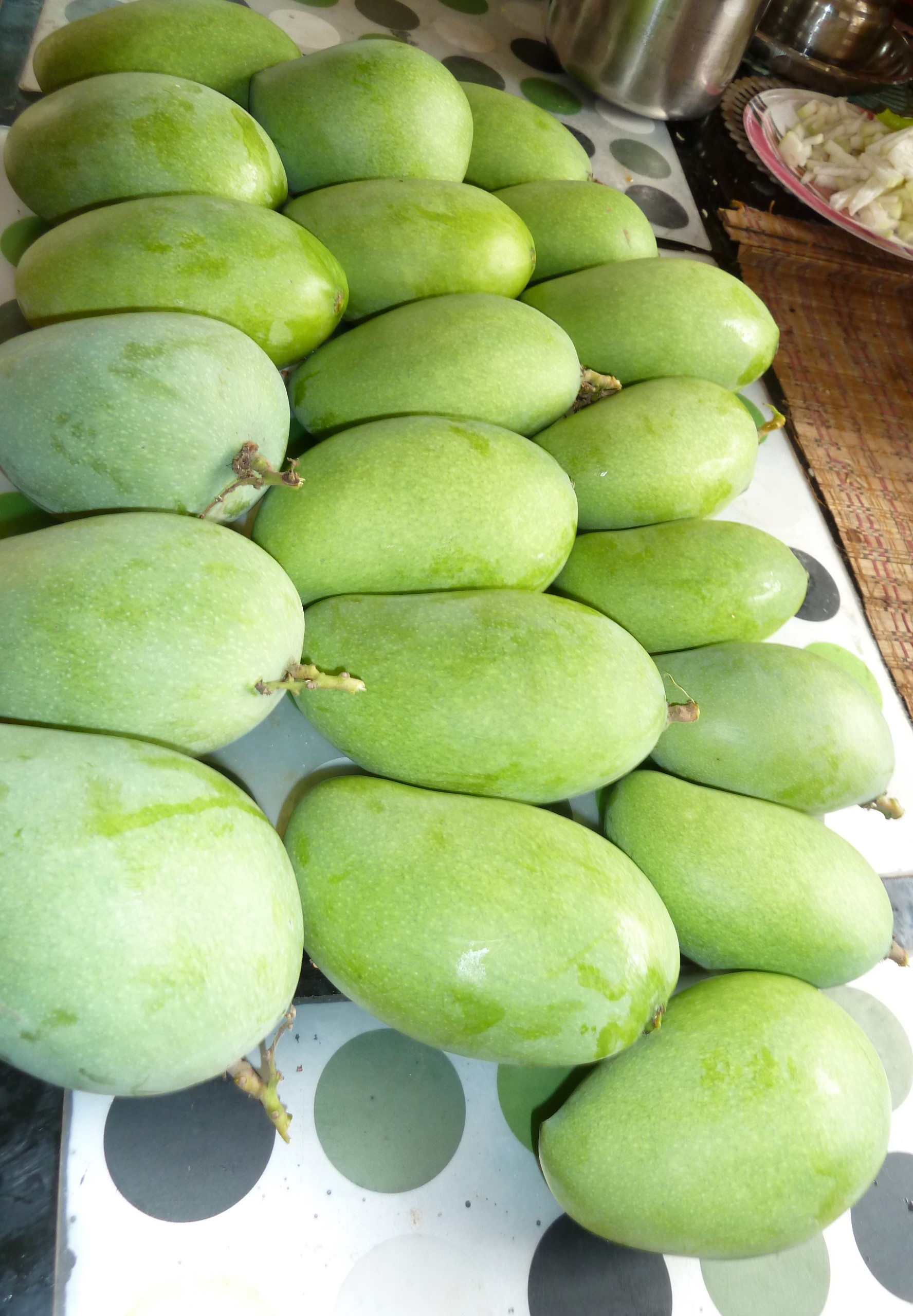 మామిడి కాయలు (పచ్చడివి)